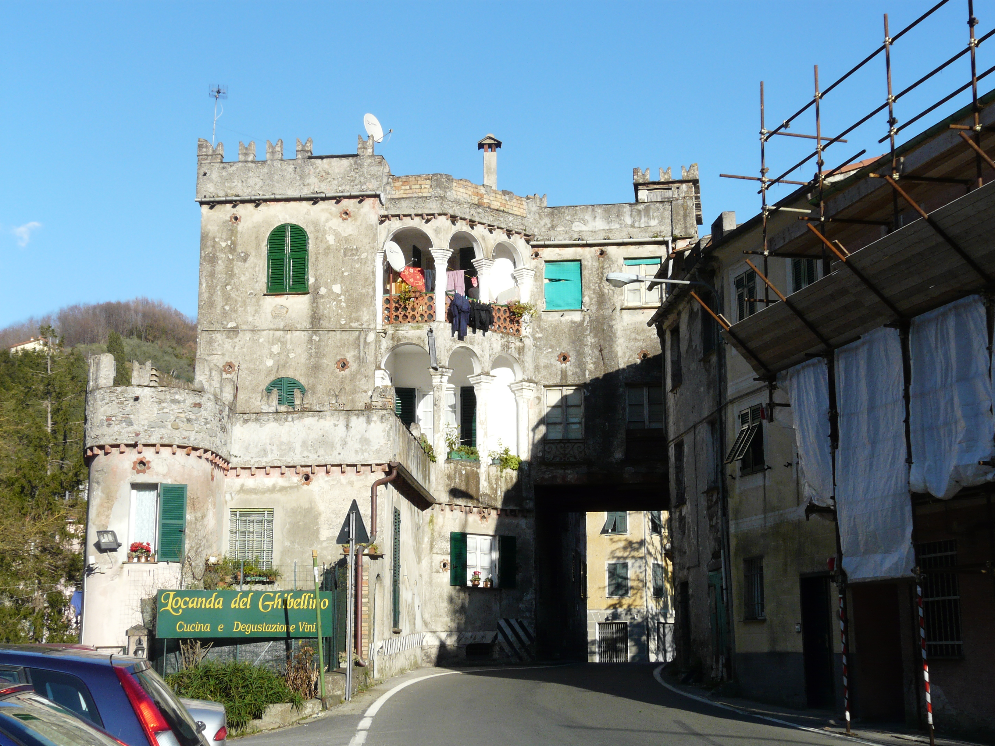 Castello Rocca, Comune di Mezzanego, Liguria, Italia